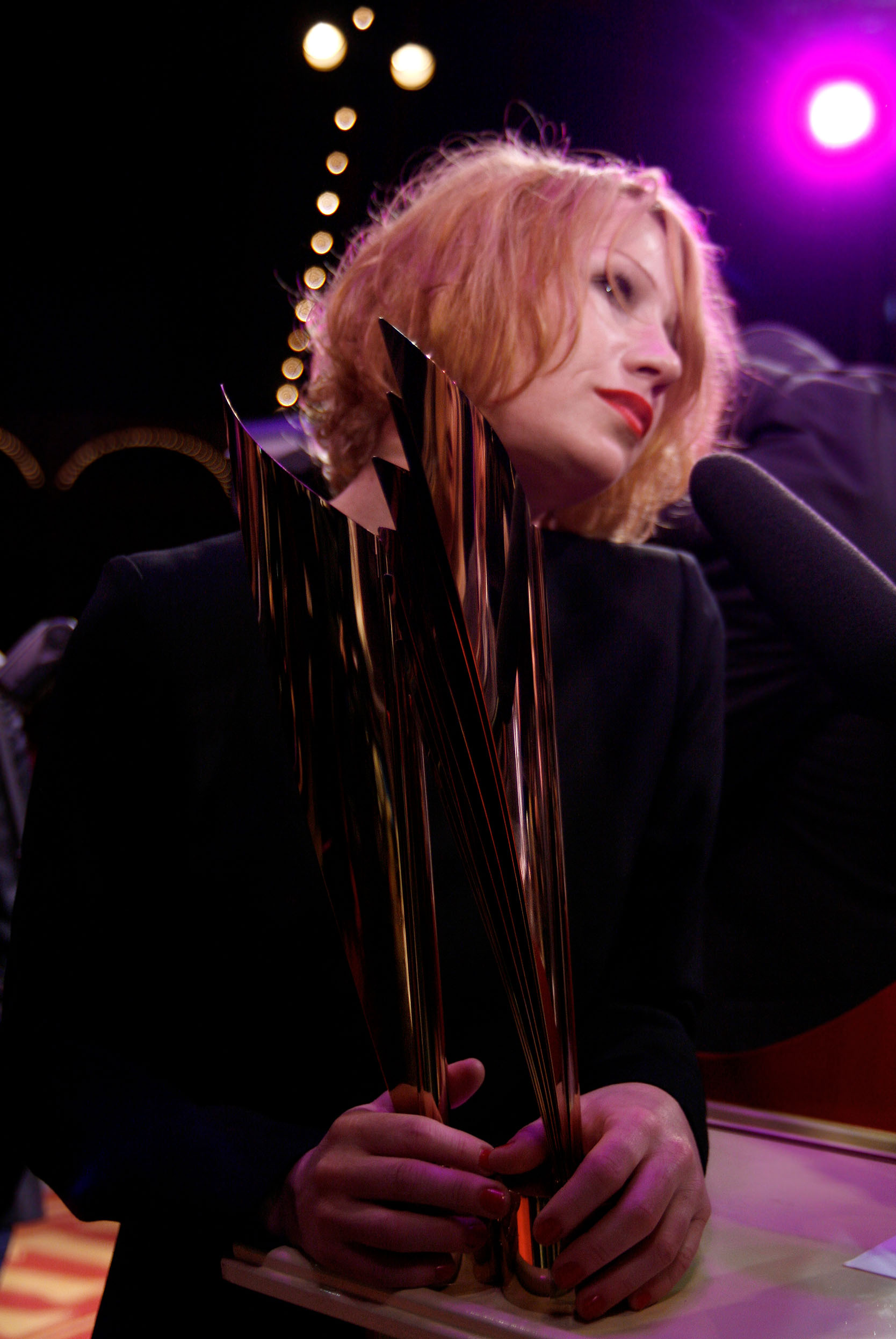 Birgit Minichmayr während der Verleihung des Nestroy-Theaterpreises 2009 (Circus Roncalli auf dem Wiener Rathausplatz).